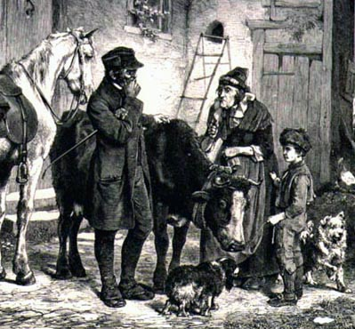 Ernst Bosch: "Die kranke Kuh"